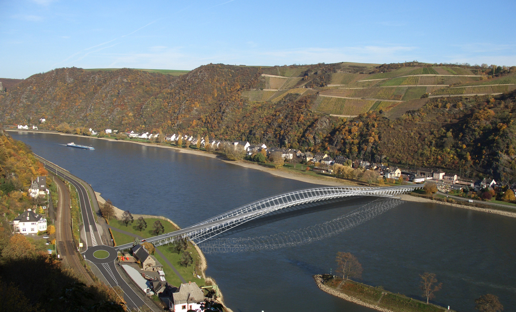 Fotomontage der Mittelrheinbrücke bei St. Goar. Entstanden als eine von sechs studentischen Arbeiten am Institut für Tragkonstruktionen und Konstruktives Entwerfen der Universität Stuttgart. Präsentiert vom 4. bis 27. Juli 2007 in der IHK Koblenz.[1]